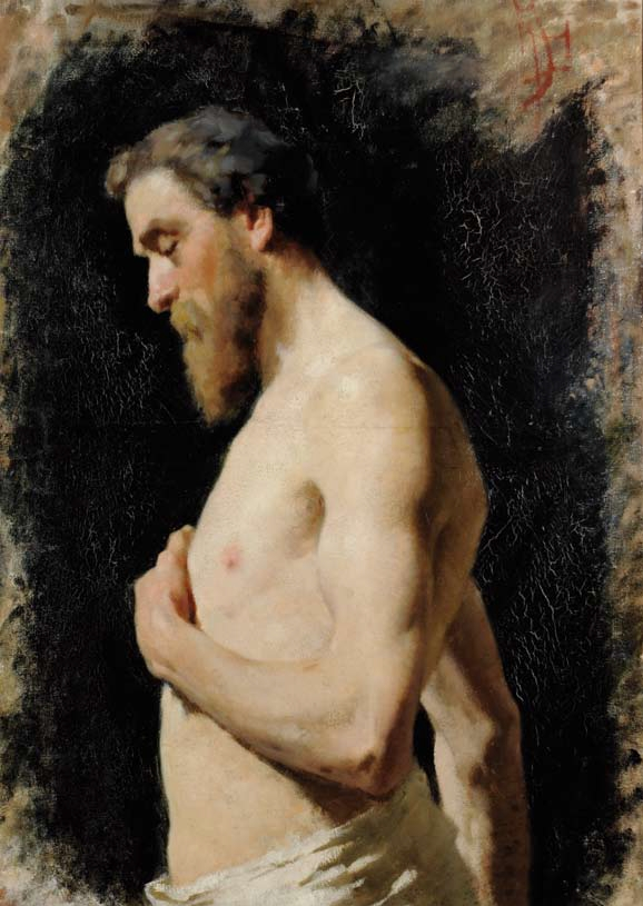 Francesco Filippini. Studio di nudo virile (1879)